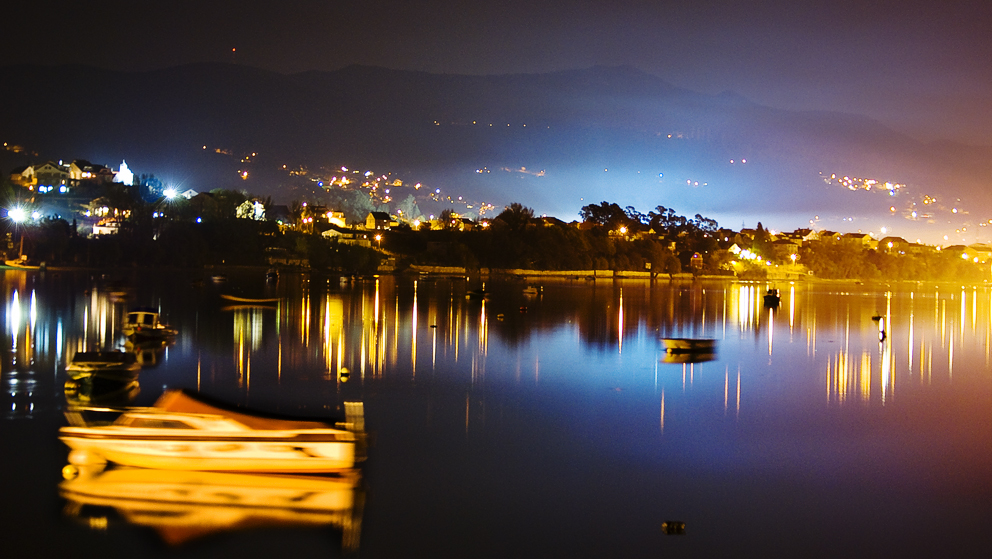 Cesantes, Redondela. Galiza